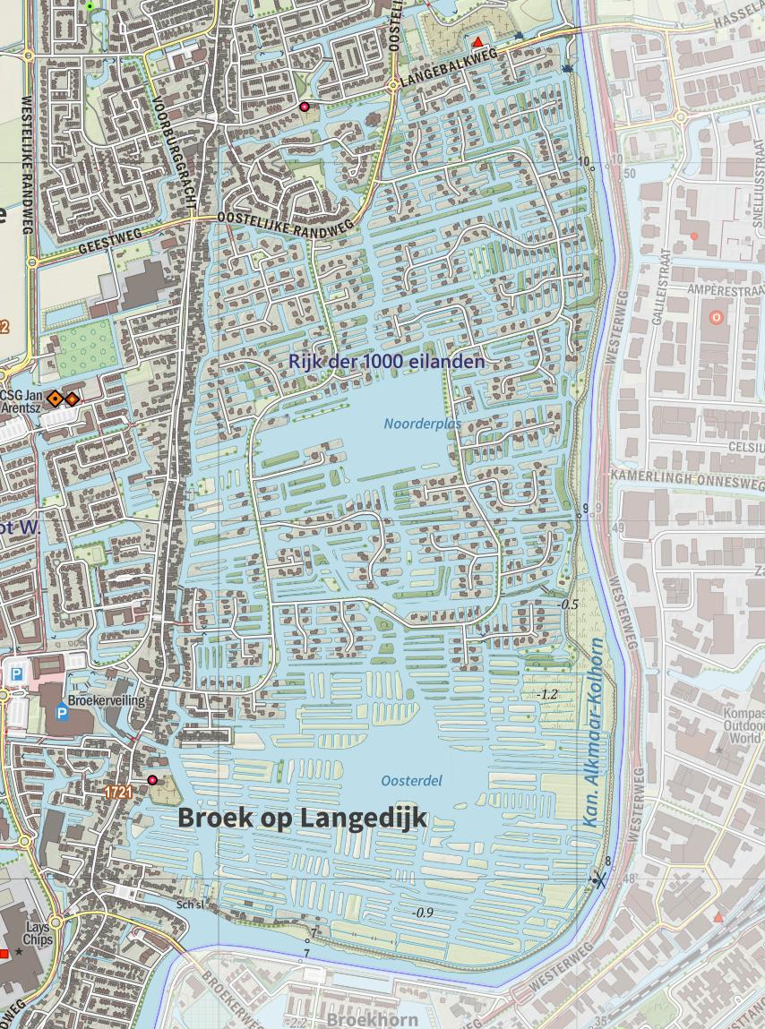 Topografische gemeentekaart. Resolutie: 400 pixels/km. Kaartbeeld samengesteld uit de open geodata van de Top10NL en Top25namen (Kadaster), Creative Commons-BY licentie. Gebouwvlakken uit open geodata BAG extract. Wegen uit de OpenStreetMap, OpenStreetMap community. Reliëfschaduw uit de Actuele Hoogtekaart AHN2. Samenstelling en kleurenschema: Jan-Willem van Aalst, met QGIS. Zie ook de Legenda.